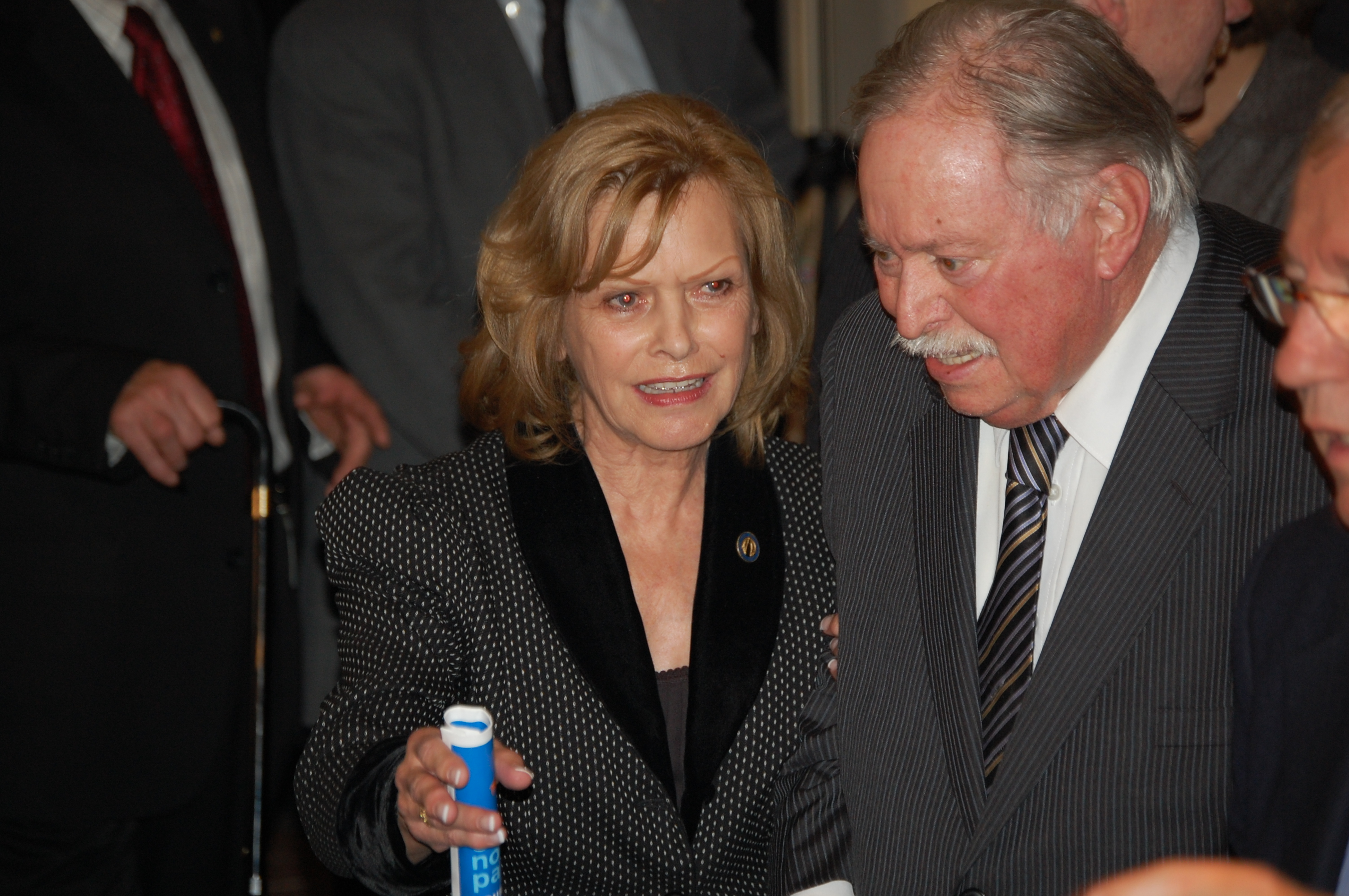 Jacques Parizeau et sa femme, Lisette Lapointe lors d'une conférence à Nicolet.